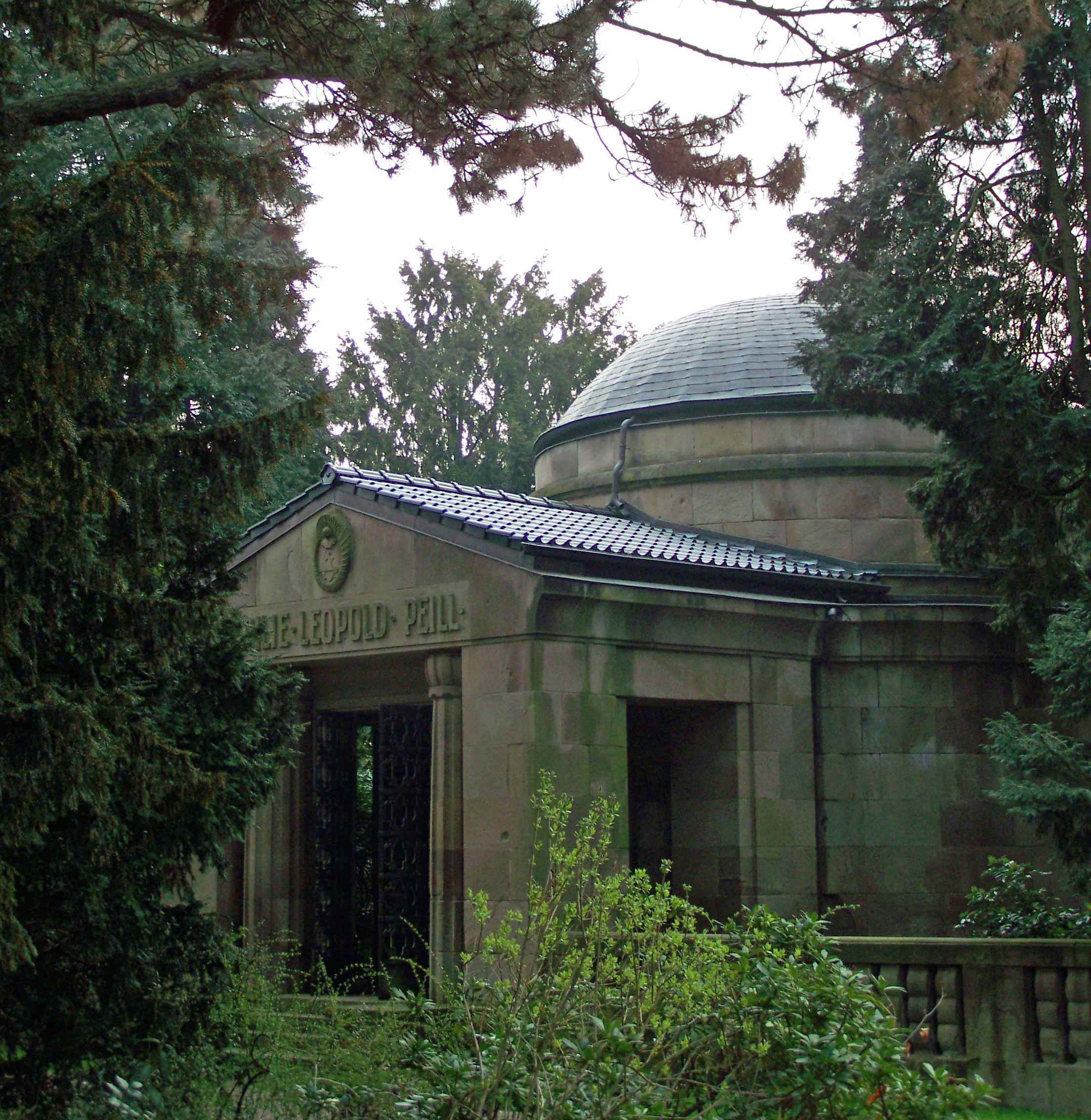 Grabmal der Familie Peill